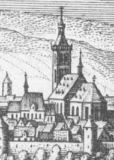 Hersfelder Stadtkirche mit spitzschlanken Dachreiter